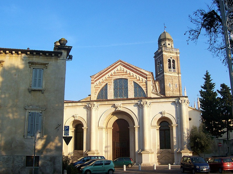 Verona - Chiesa di S. Maria in Organo